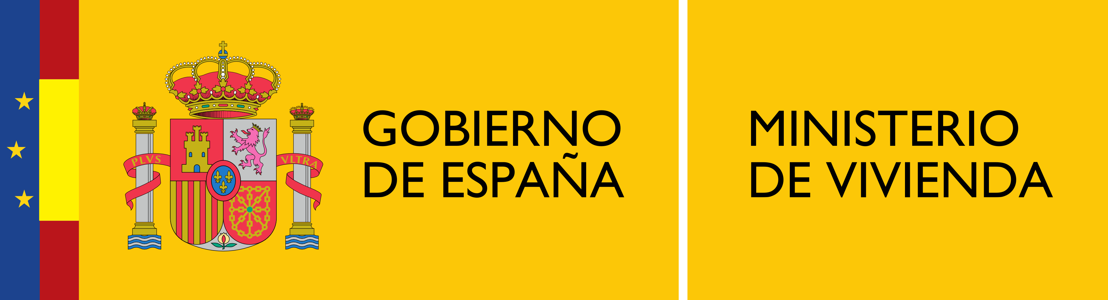 Logotipo del Ministerio de Vivienda